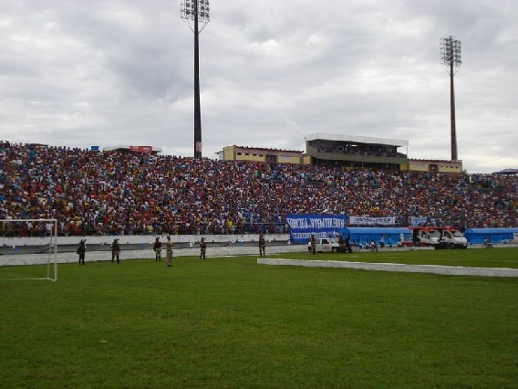 Torcida Jovem do Itabuna no Estádio Luiz Viana Filho.